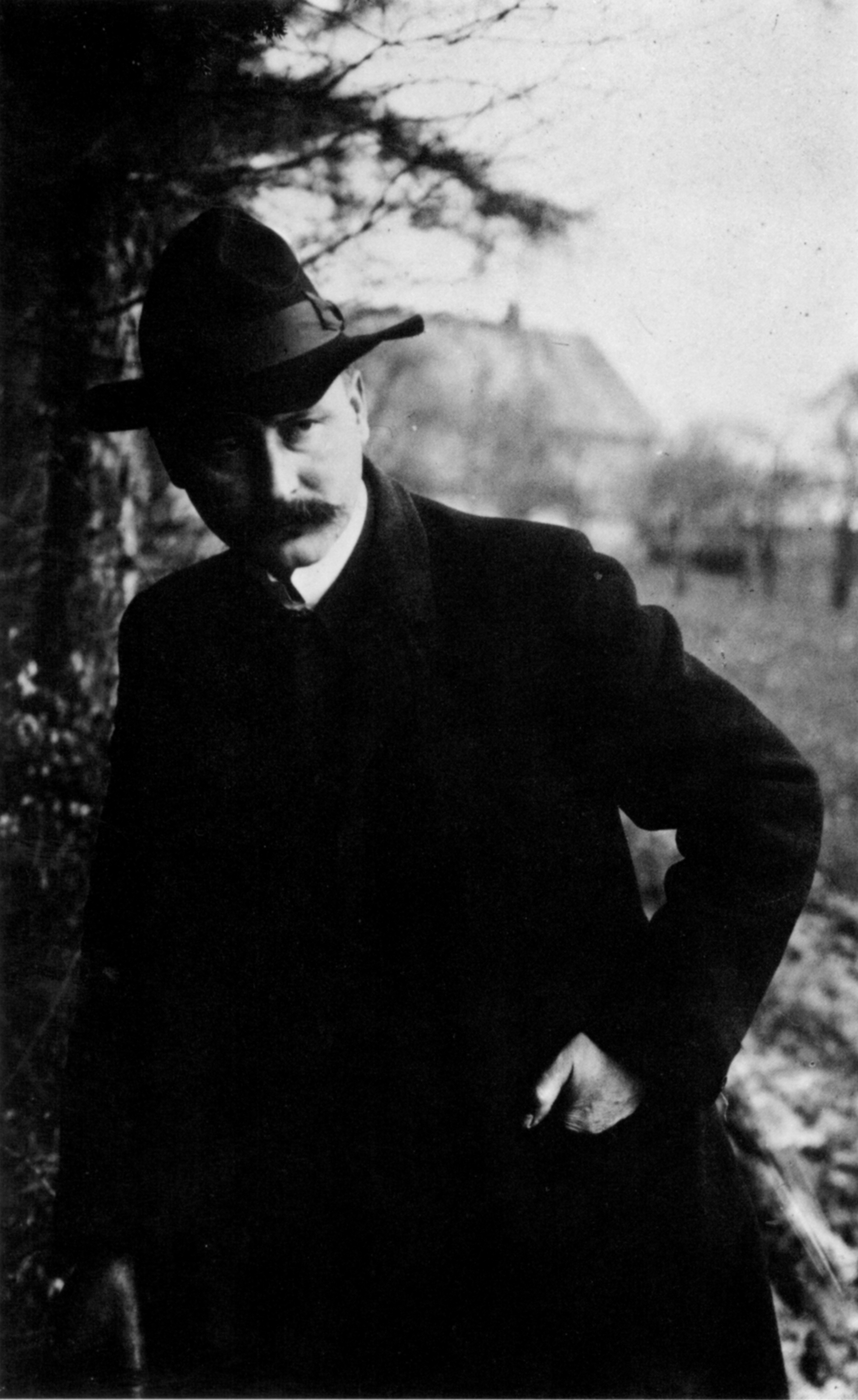 Portrait Peter Scherer, Fotograf